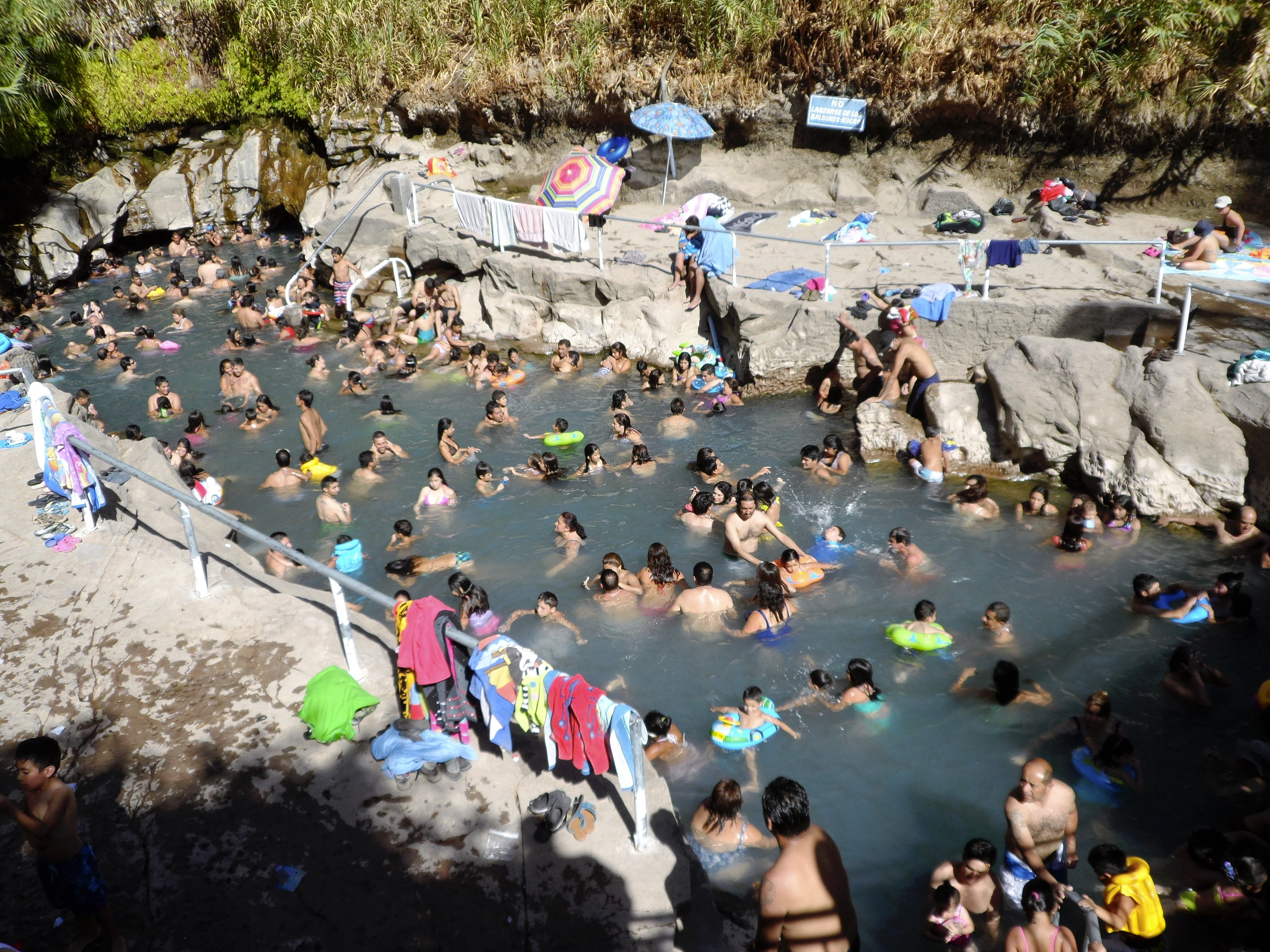 Cocha, Oasis de Pica a 147 km. De la ciudad de Iquique. I región.